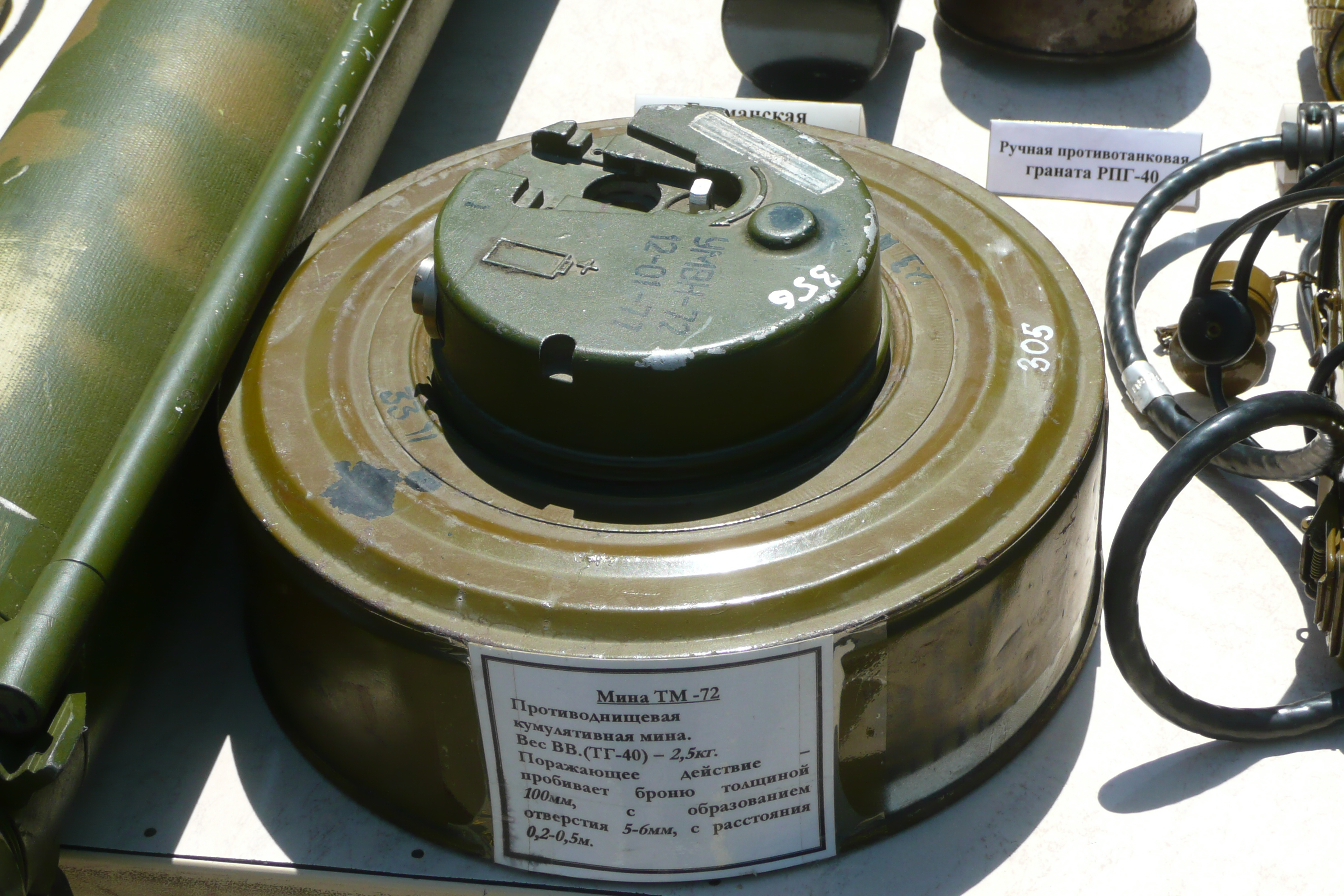 Противотанковая мина ТМ-72 продемонстрированная в День защиты детей в Донецке